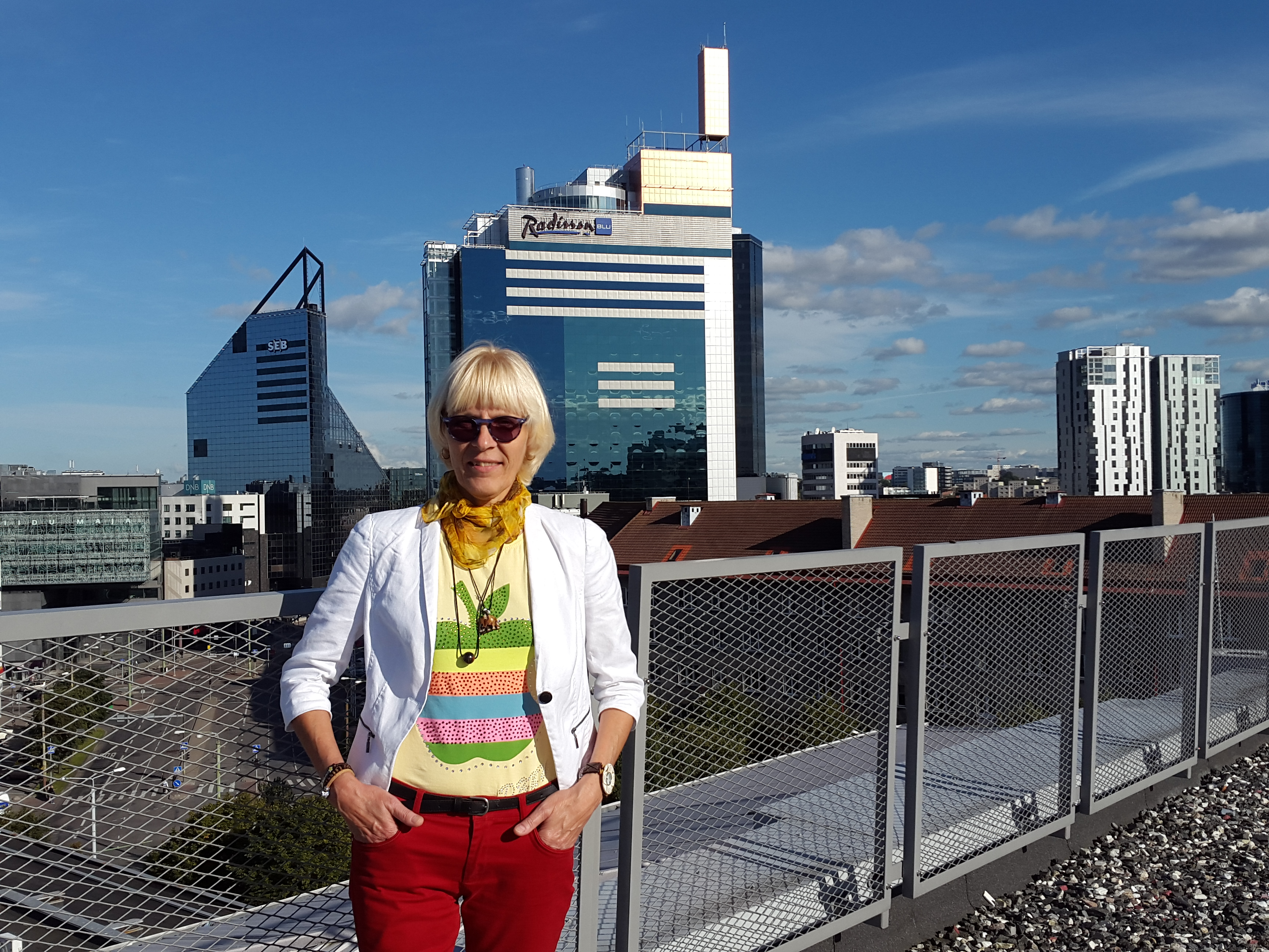 Eve Pormeister Tallinna Ülikooli Akadeemilise Raamatukogu katusel. 6.09.2016